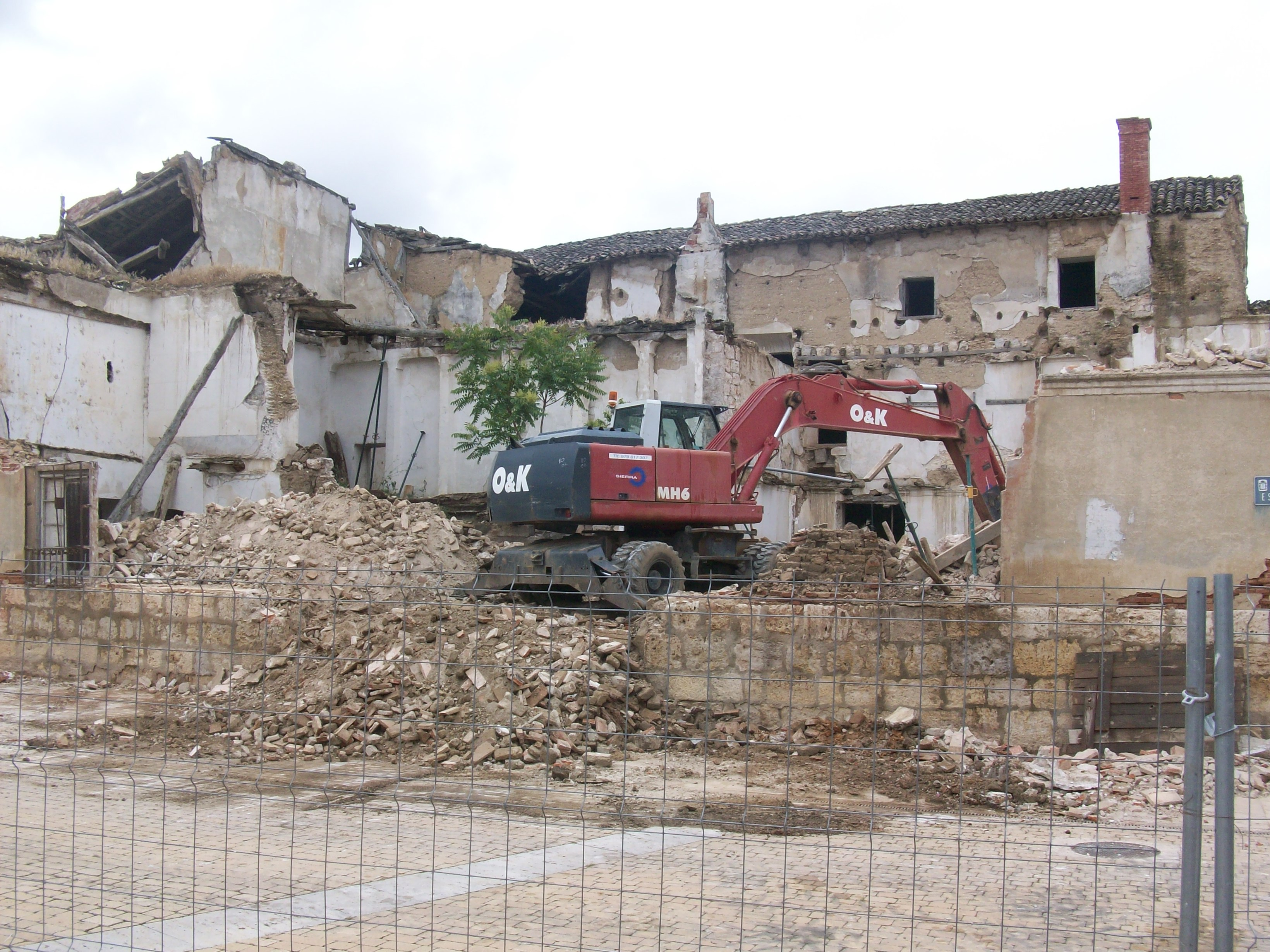 Derrumbe de 2011 de la fachada que da a la Plaza de España del Palacio de los condes de Buendía en la localidad palentina de Dueñas.